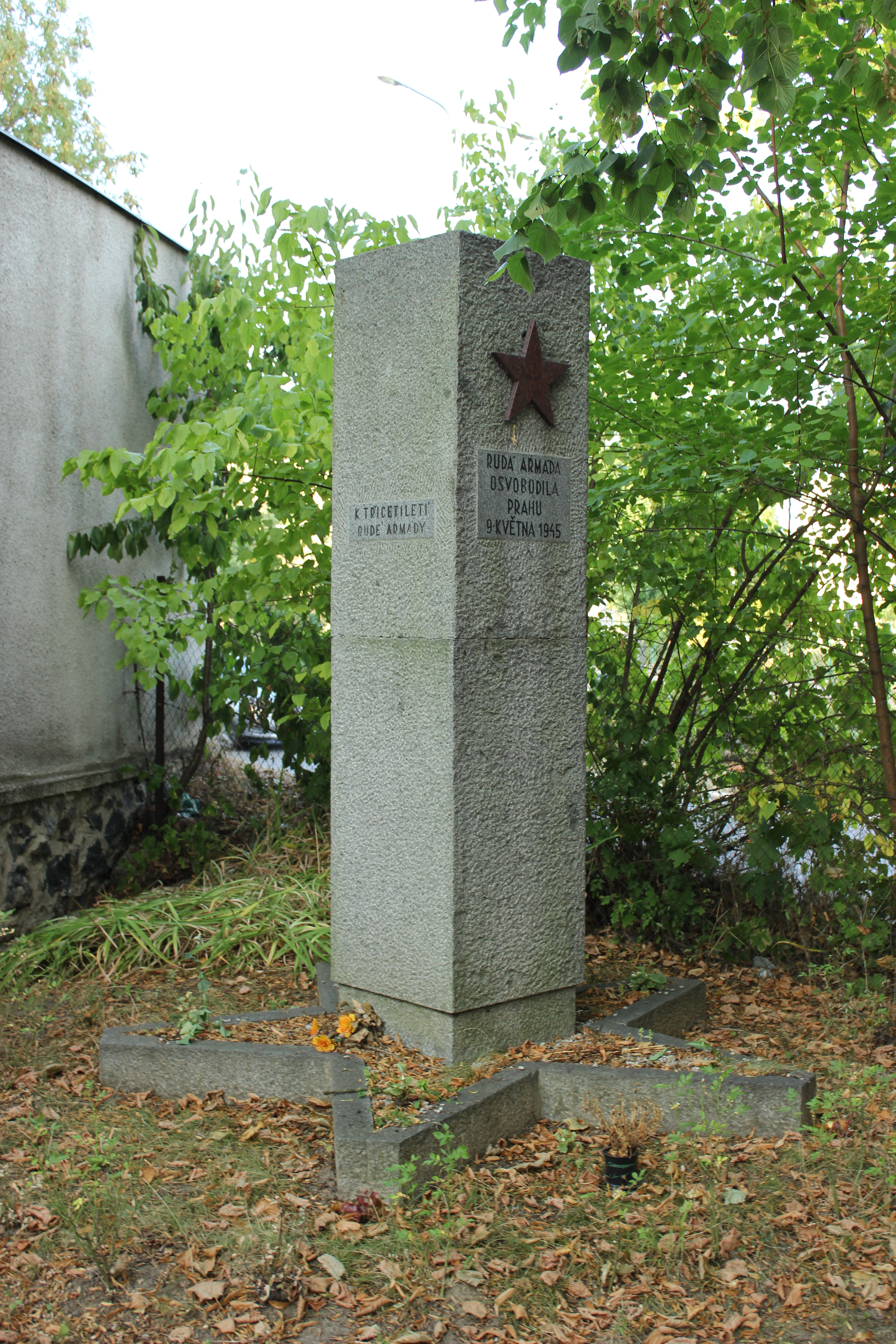 Pomník sovětským osvoboditelům na pražském Kobyliském hřbitově. Project: Fotíme Česko